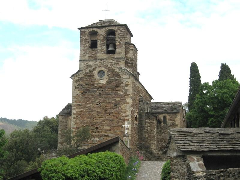 Eglise romane du 12ème siècle à Peyremale